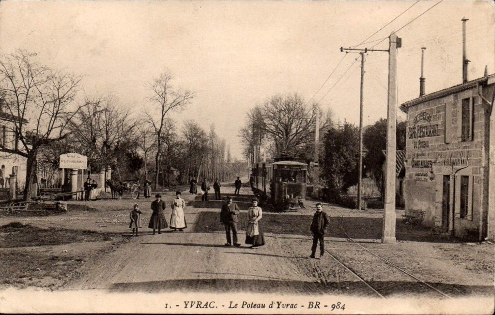 Yvrac